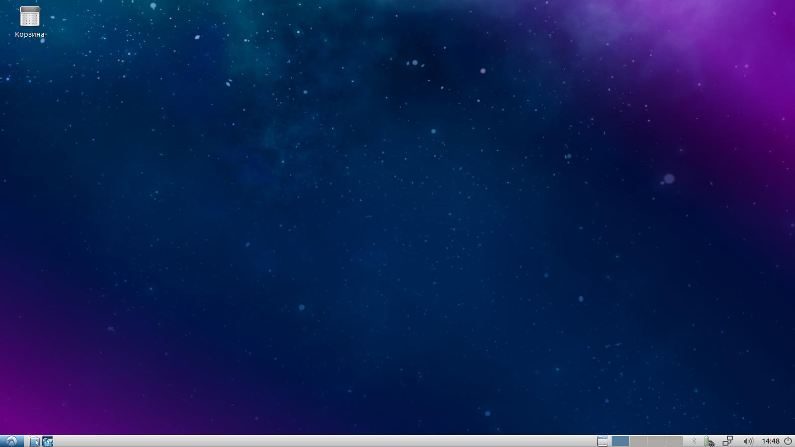 Скриншот с моего ПК